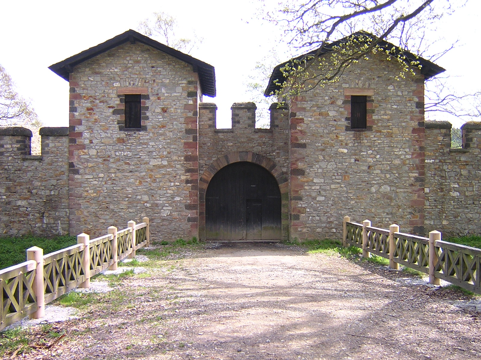 Seiteneingang des Römerkastells Saalburg bei Bad Homburg